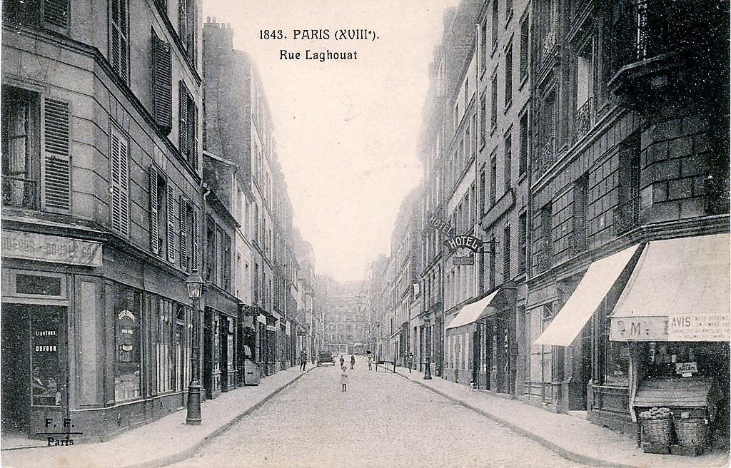 Carte postale - 1843. Paris (XVIIIe). Rue Laghouat